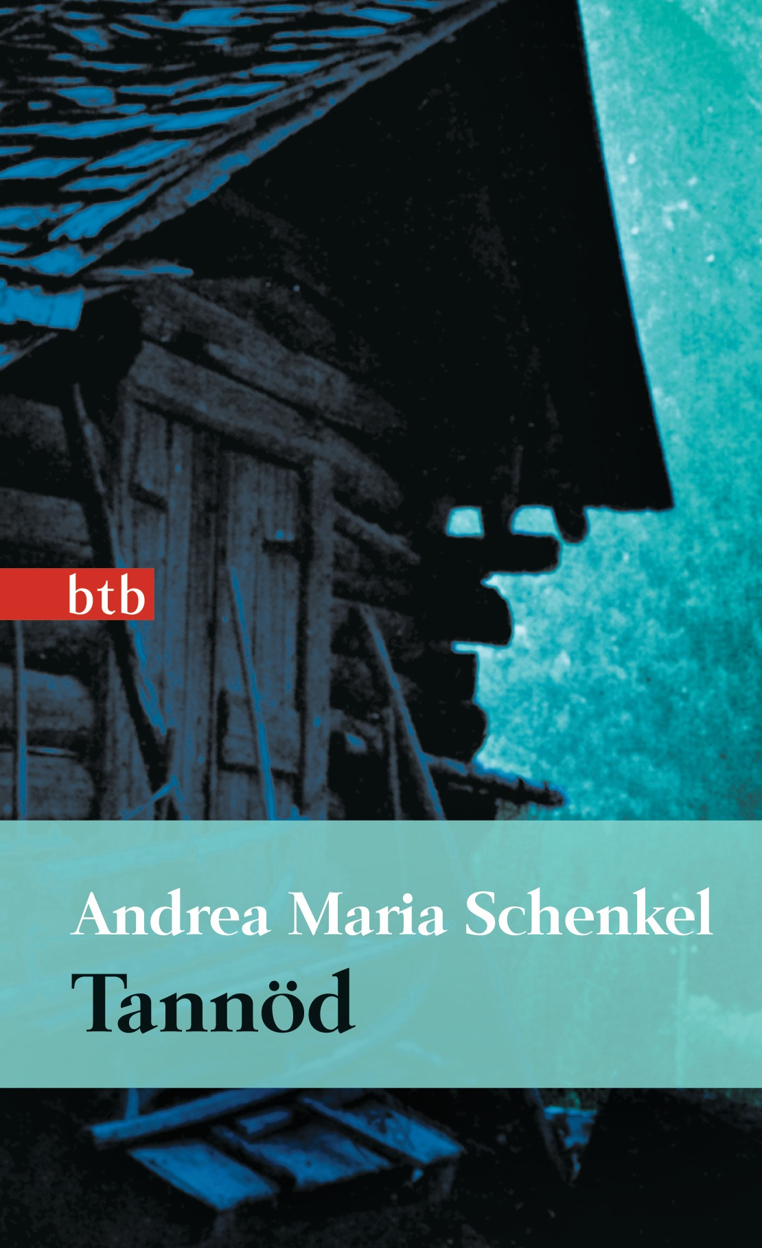 Andrea Maria Schenkel: Tannöd. btb, München 2008. DNB